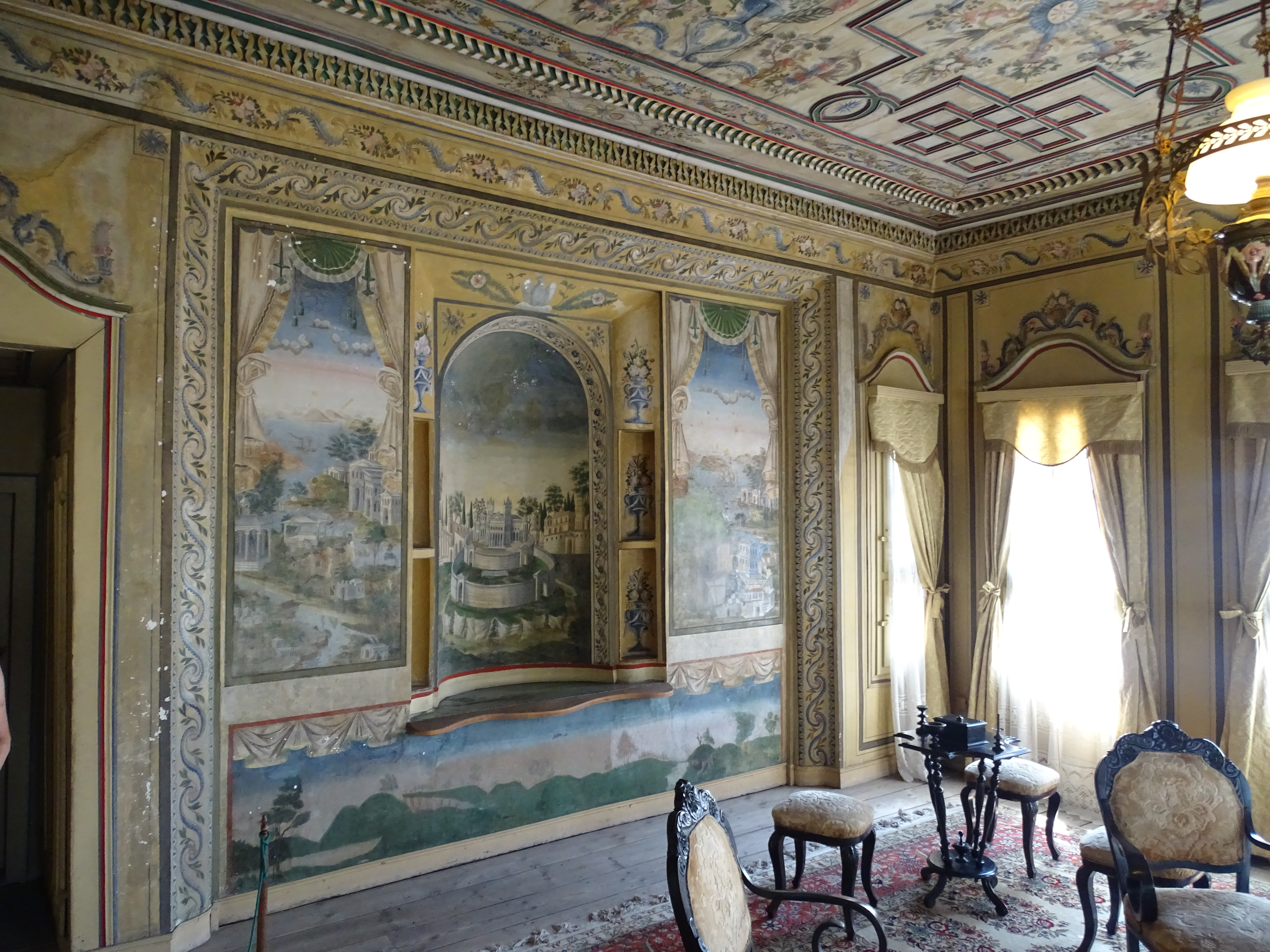 Het Hindliyanhuis in Plovdiv, Bulgarije.